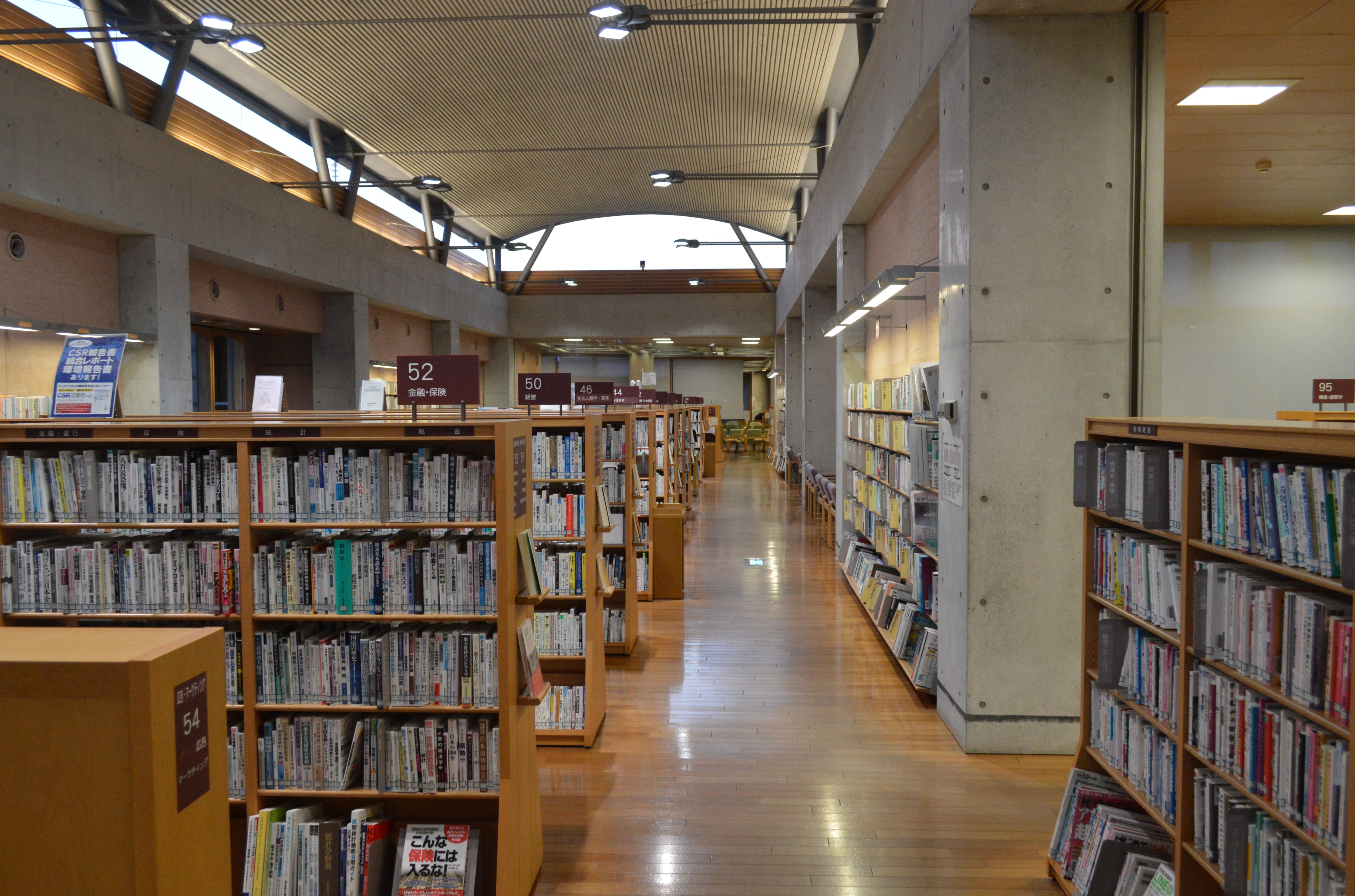 愛知県田原市 田原市中央図書館（田原市図書館）1階の書架